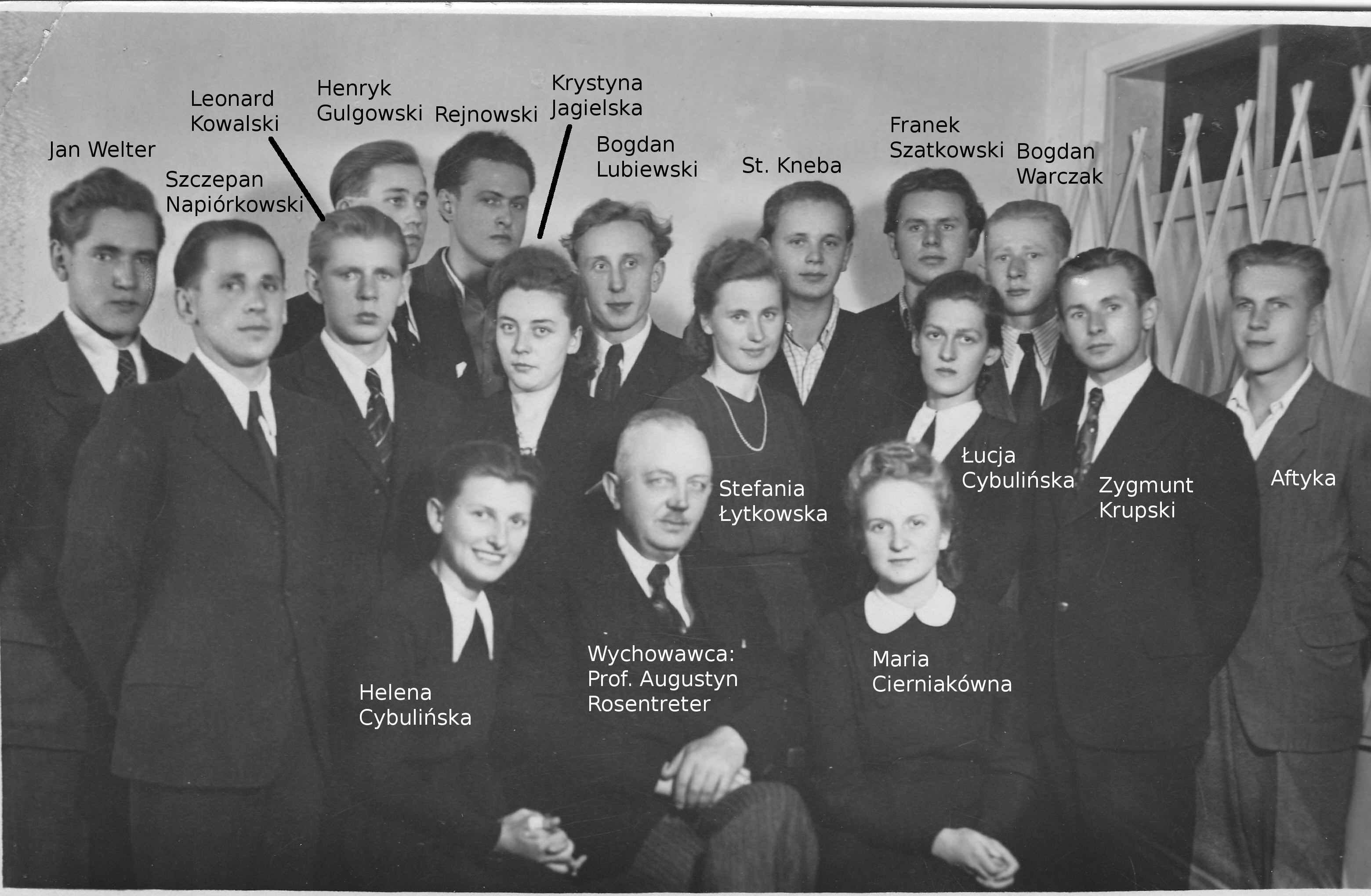 Matura w Tucholi 1948 z opisem (LO im. B. Nowodworskiego, pierwsza powojenna klasa maturalna)